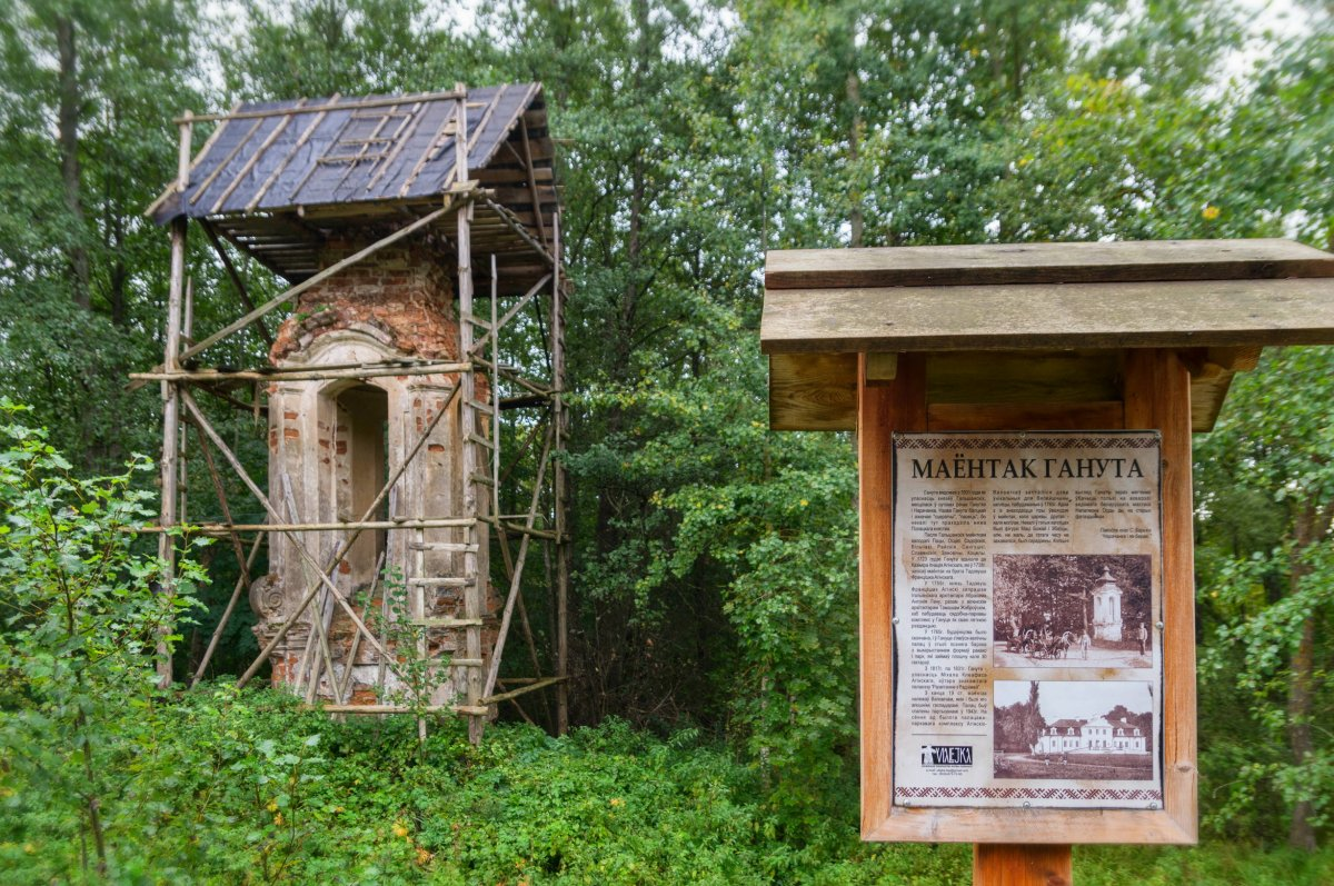 Ручыца. Рэшткі капліцы